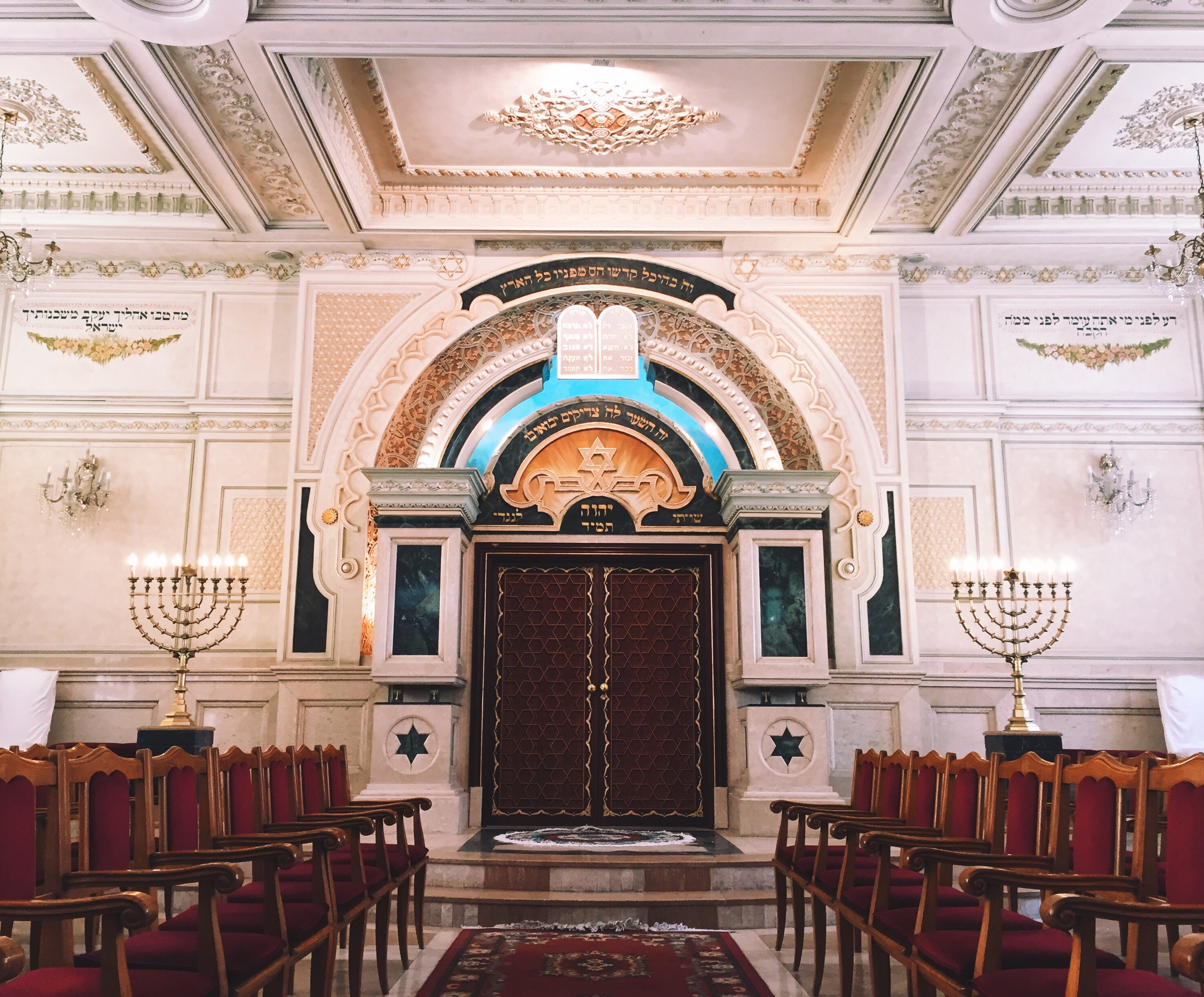 معبد بيت إيل في مدينة الدار البيضاء المغربية